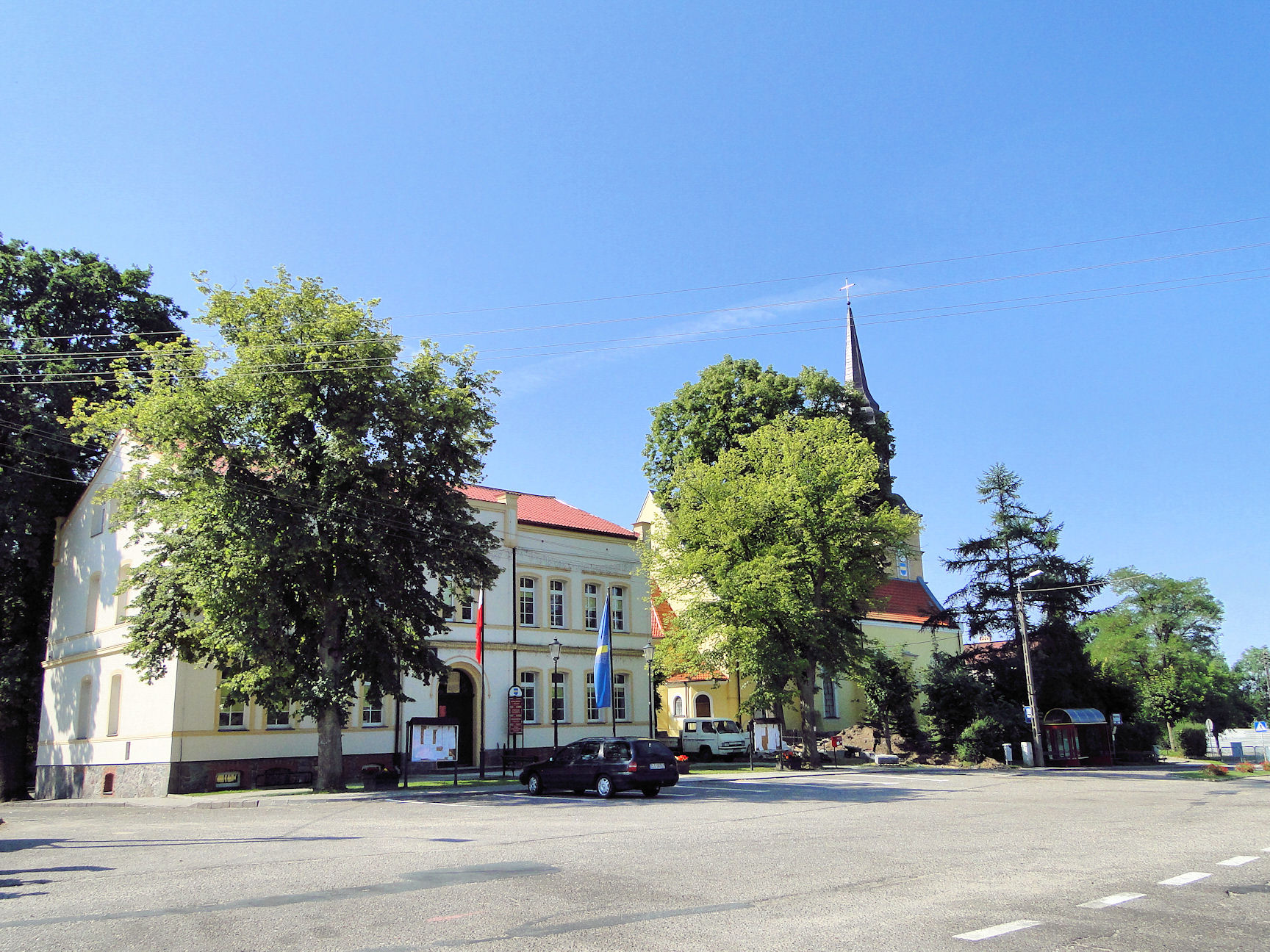 Rynek w Węgorzynie